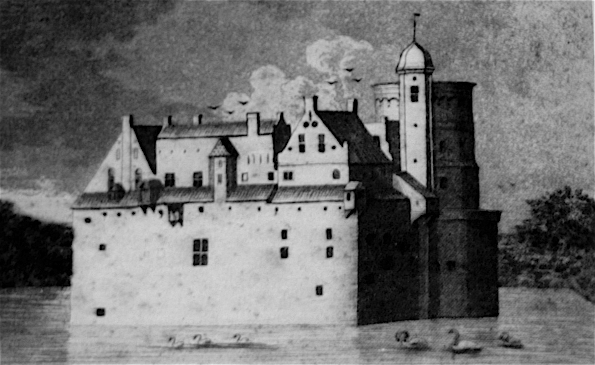 Burg Greetsiel- Ansicht von der Ostseite. Aquatinta von C. B. Meyer